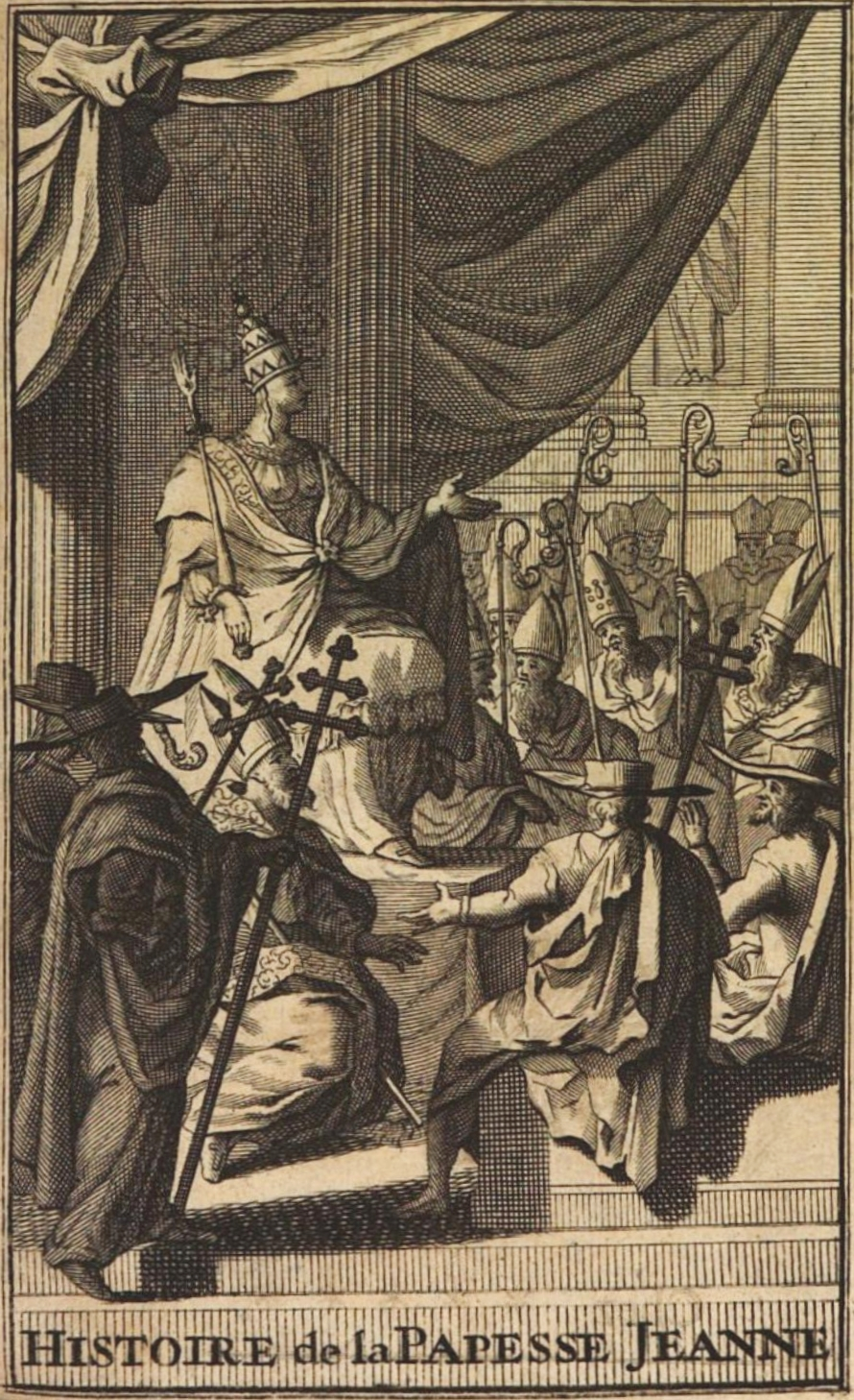 Päpstin Johanna. In: Histoire de la Papesse Jeanne, fidèlement tirée de la dissertation latine de Monsieur de Spanheim,... [par Jacques Lenfant]. chez +/+, 1695